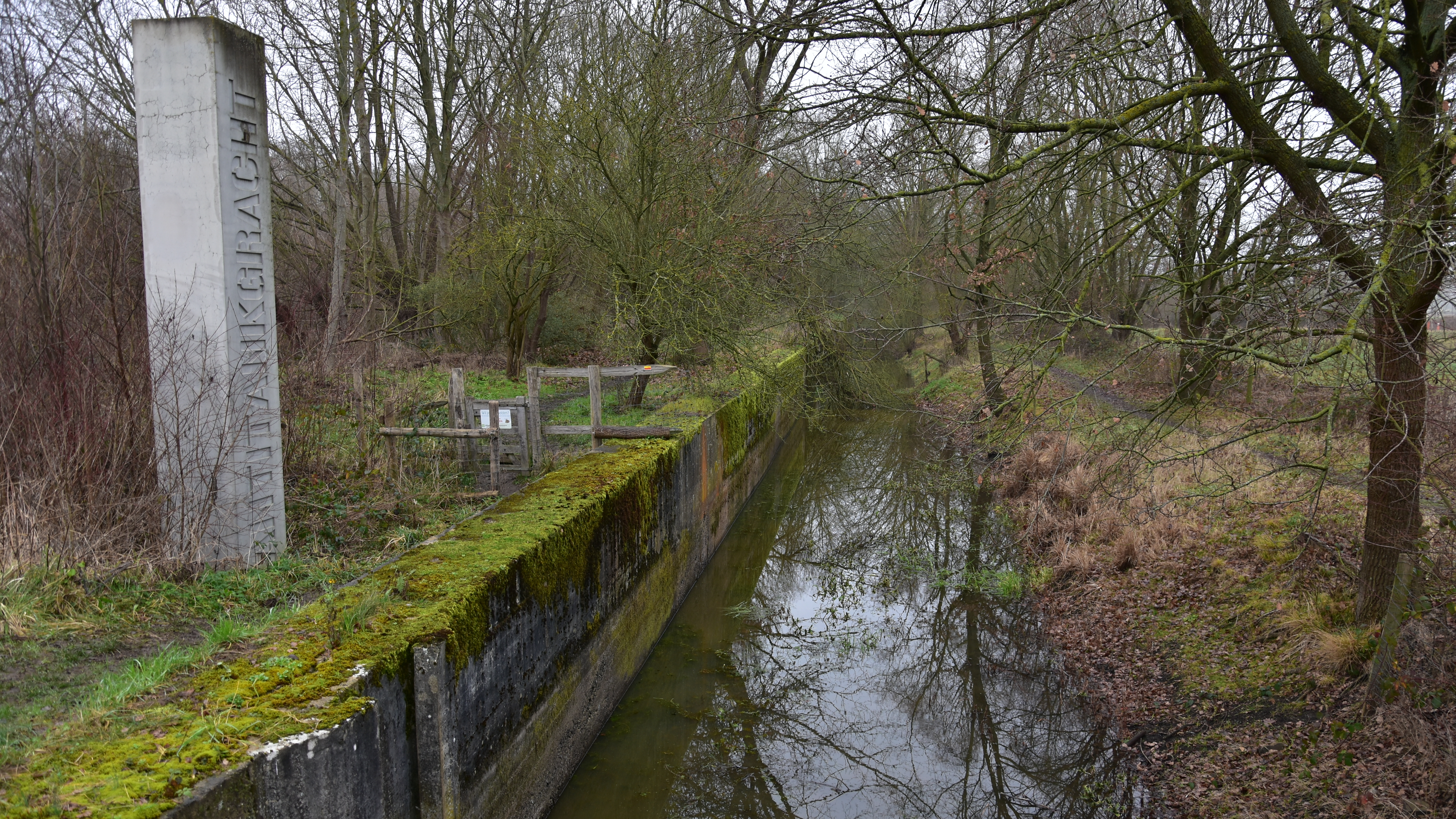 Antitankgracht Haacht 24-01-2020 13-34-20